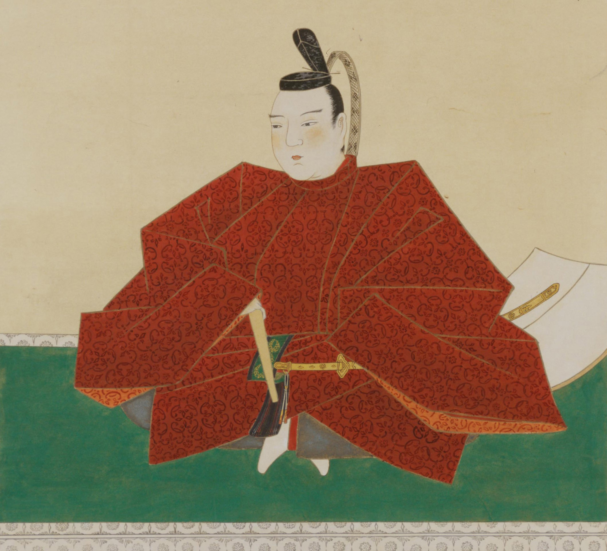 津軽信義の肖像。